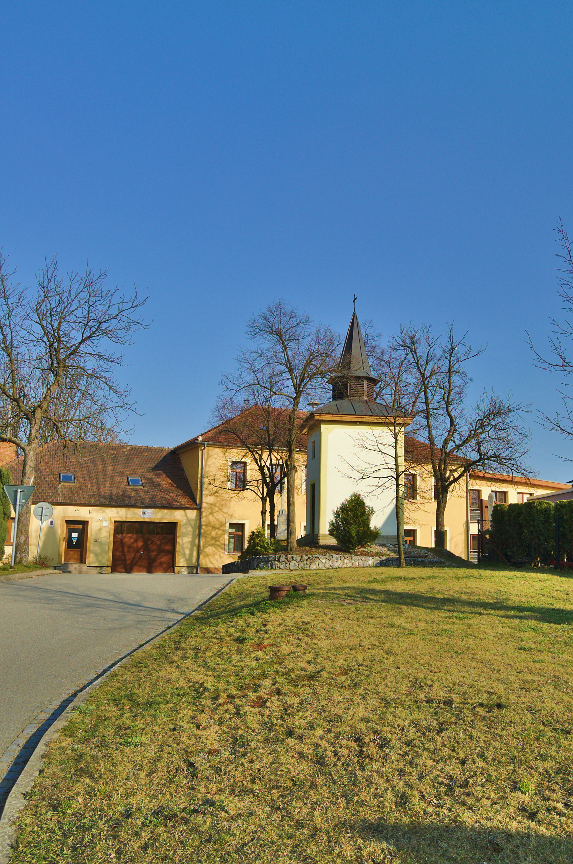 Kaplička, Vavřinec, okres Blansko